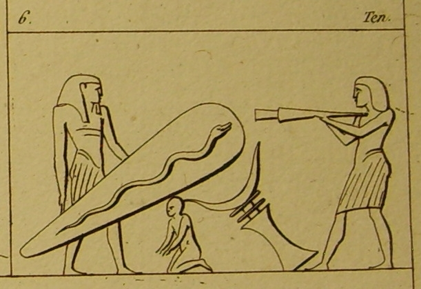 Denon (1802): Voyage dans la haute et la basse Égypte, Detail de la planche 127 (No. 6). Example of "Dendera light"-relief from Isis Temple, Dendera (ptolemaic era): birth of the sun god Harsomtus (as snake) from the womb of Nut. Beispiel einer ägyptischen "Glühbirnen"-Darstellung: Geburt des Sonnengottes Harsomtus (schlangenförmig) aus dem Leib der Nut. Isis-Tempel von Dendera, ptolemäische Zeit. original 1802-explanation: explication